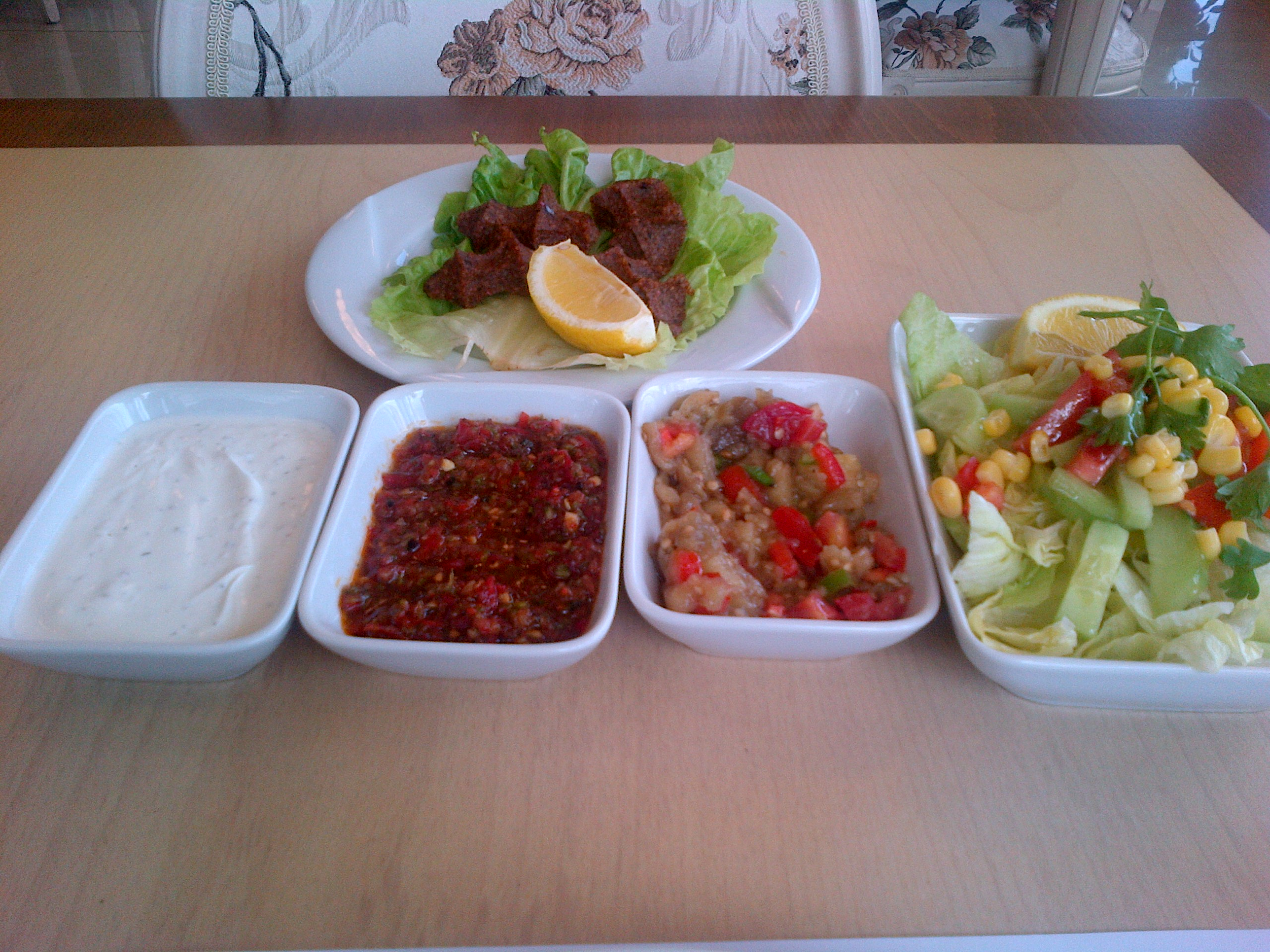 Una ensalada y algunos platillos de meze (delante, de izq. a der: "Haydari", "Ezme", "Patlıcan salata", "Mevsim salata", detras: Çiğ köfte) ofrecidos en un restaurante turco como "amuse-bouches".